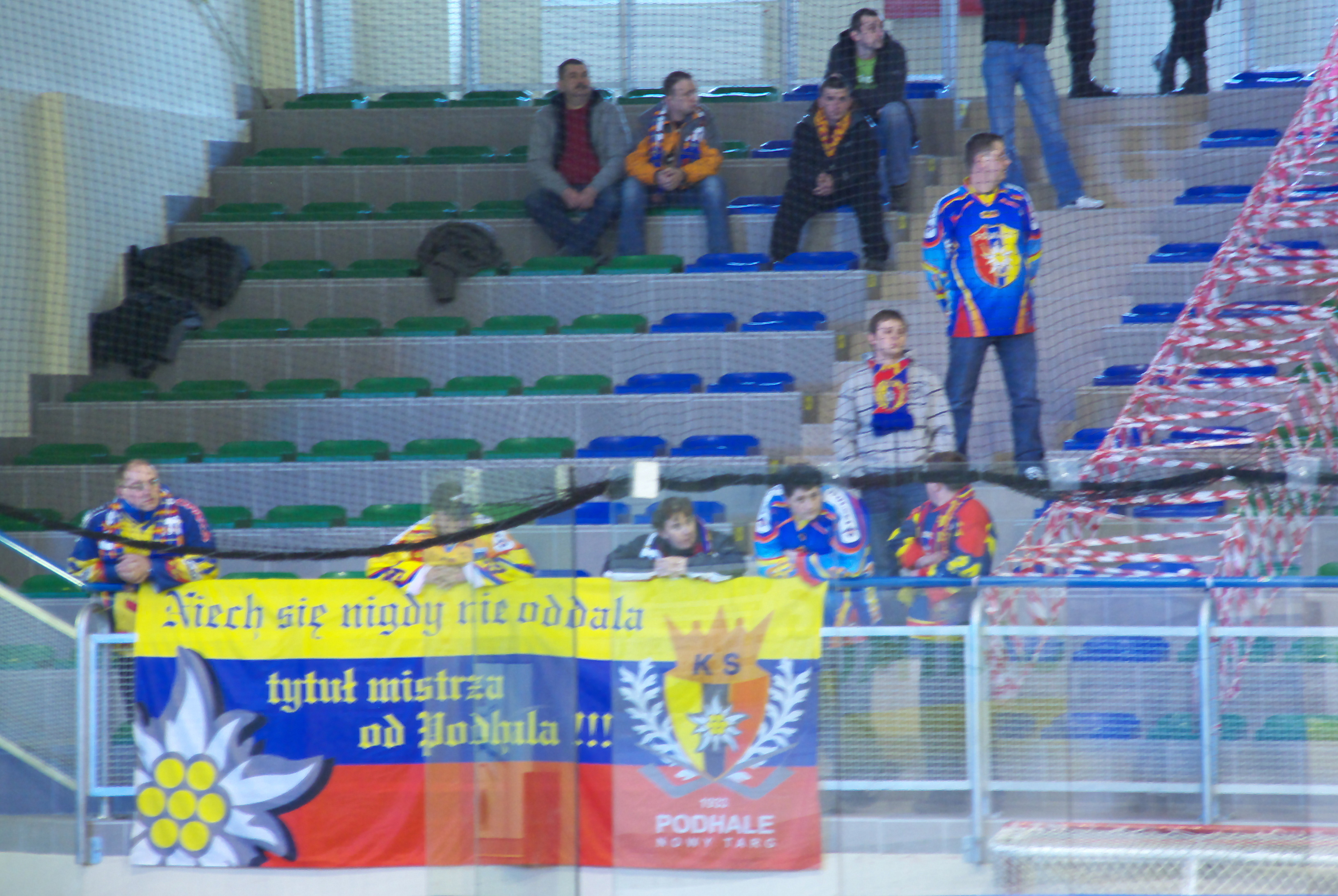 Kibice podczas meczu Ciarko KH Sanok - MMKS Podhale Nowy Targ (7:4) 20 marca 2011, Arena Sanok.